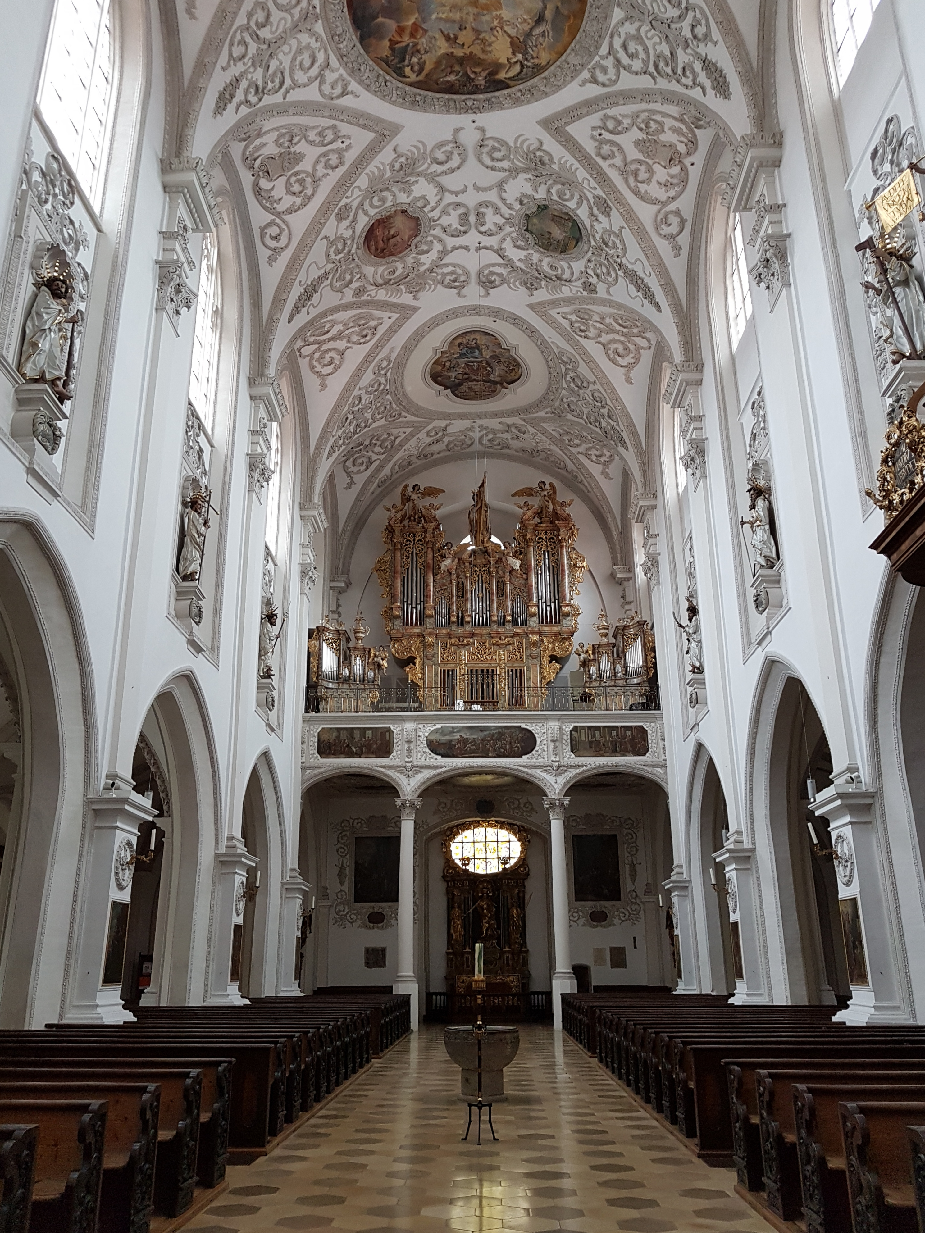 Mariä Himmelfahrt (Landsberg am Lech), Innenraum mit Blick zur Empore.